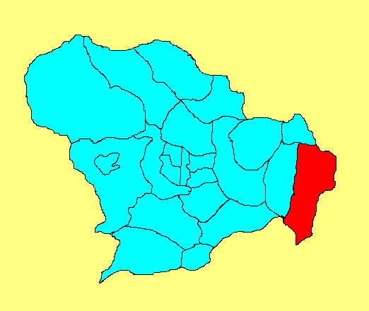 辛集市在石家庄市的位置；此图片由王云峰wangyunfeng原创，用于WIKI。